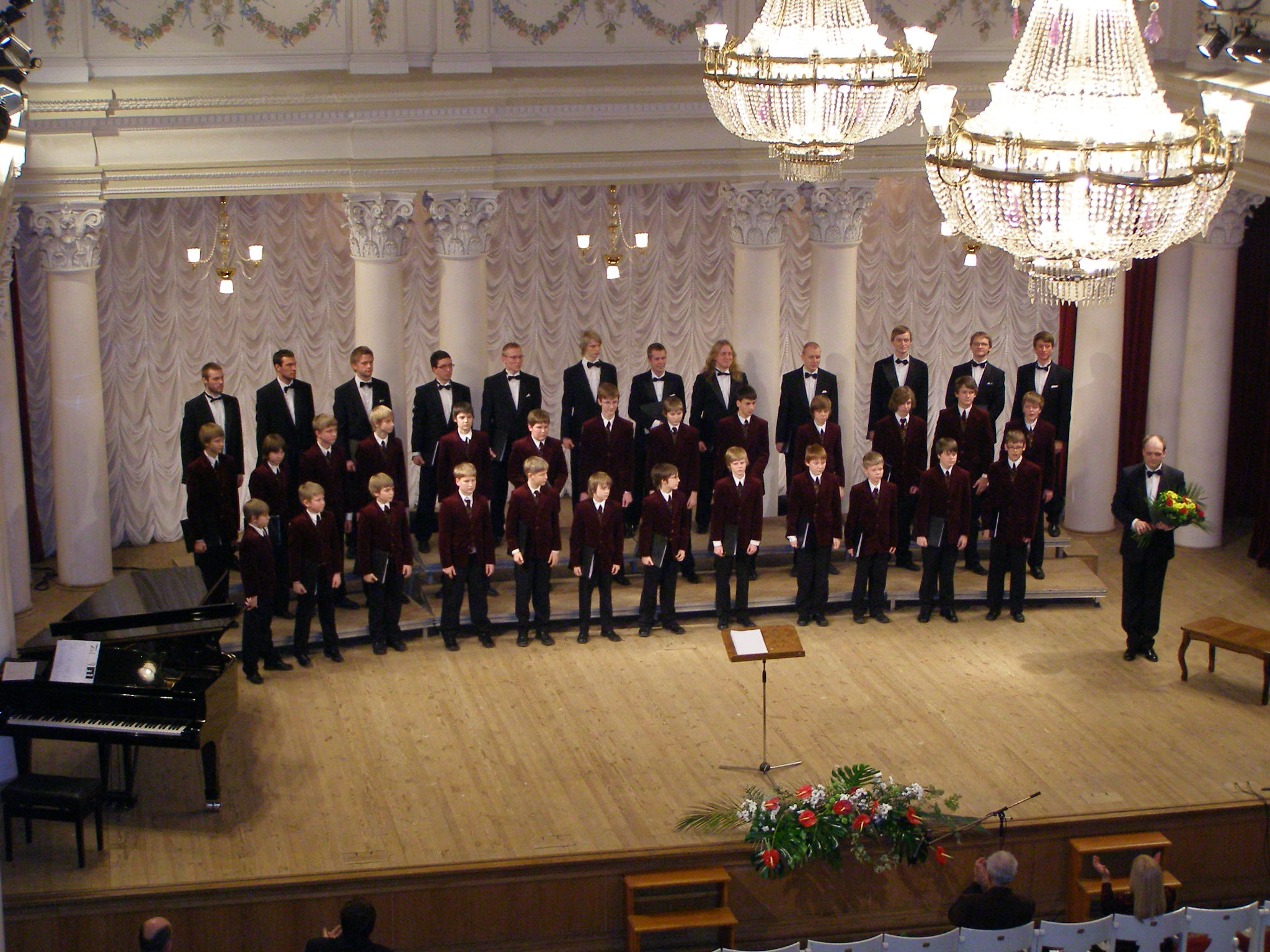 conductor Hirvo Surva